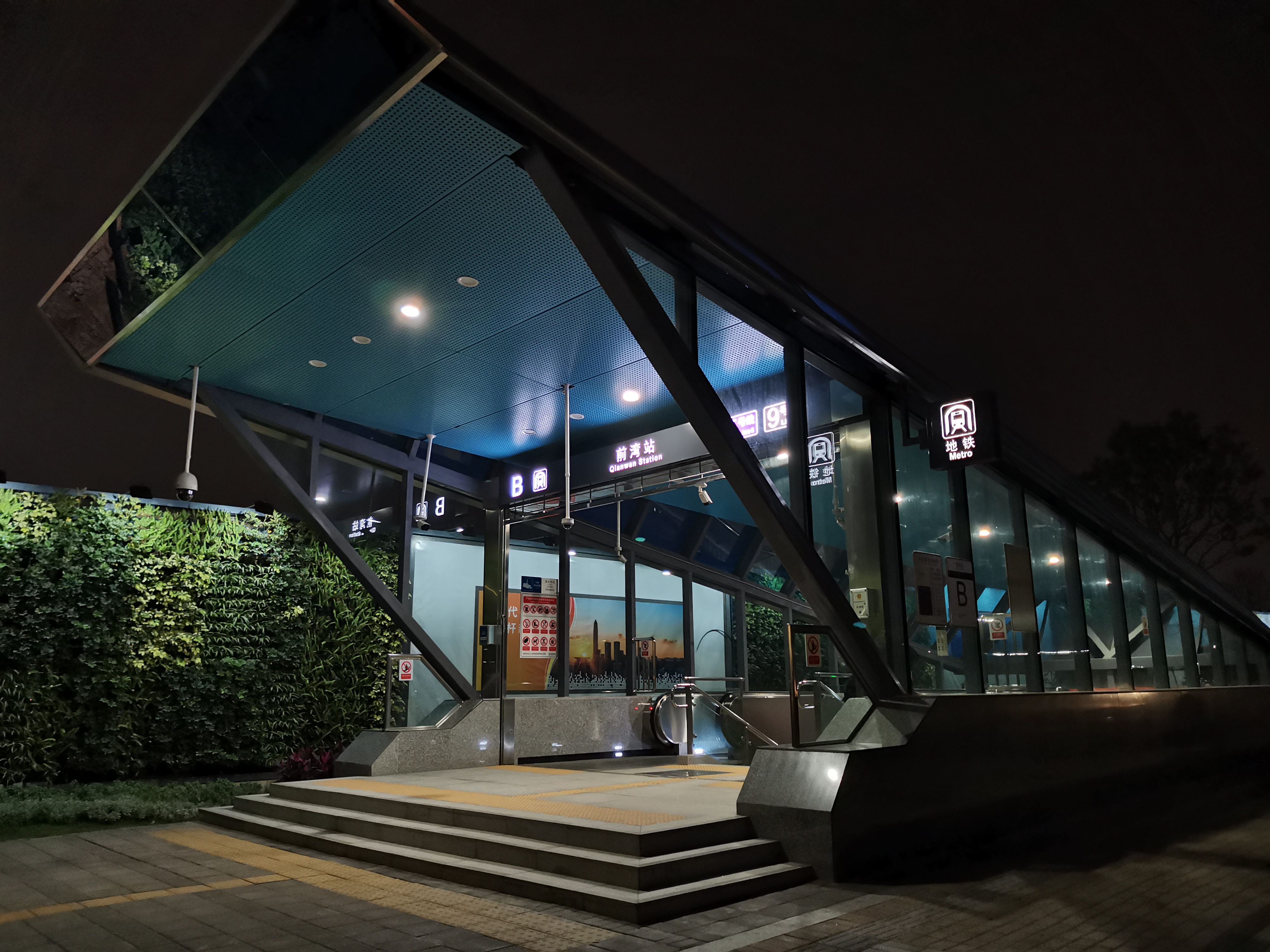 前湾站B出口